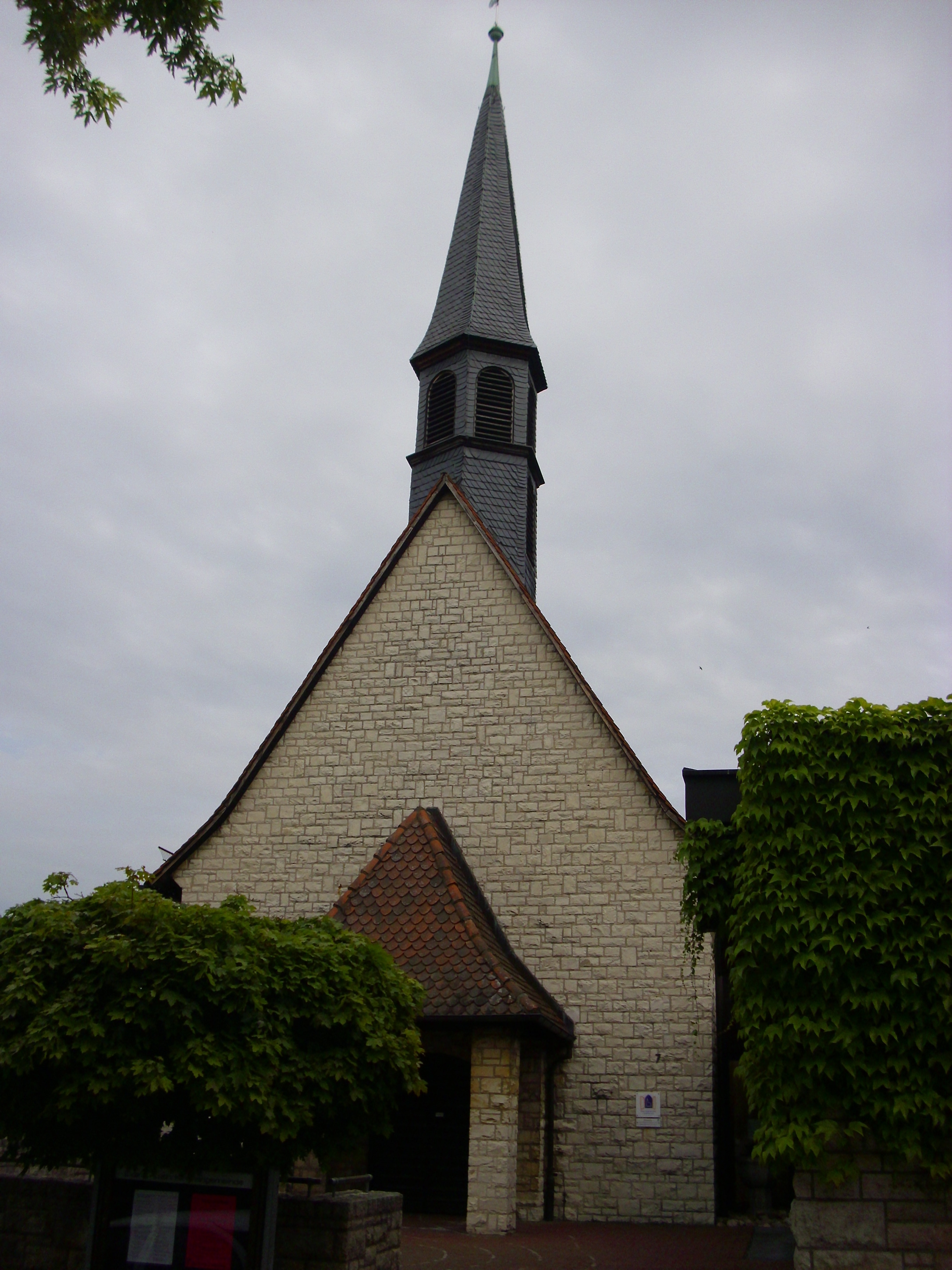 Die evangelische Lukaskirche befindet sich in der Bergstraße 7 in Bubenreuth und wurde am 22. Dezember 1957 geweiht.